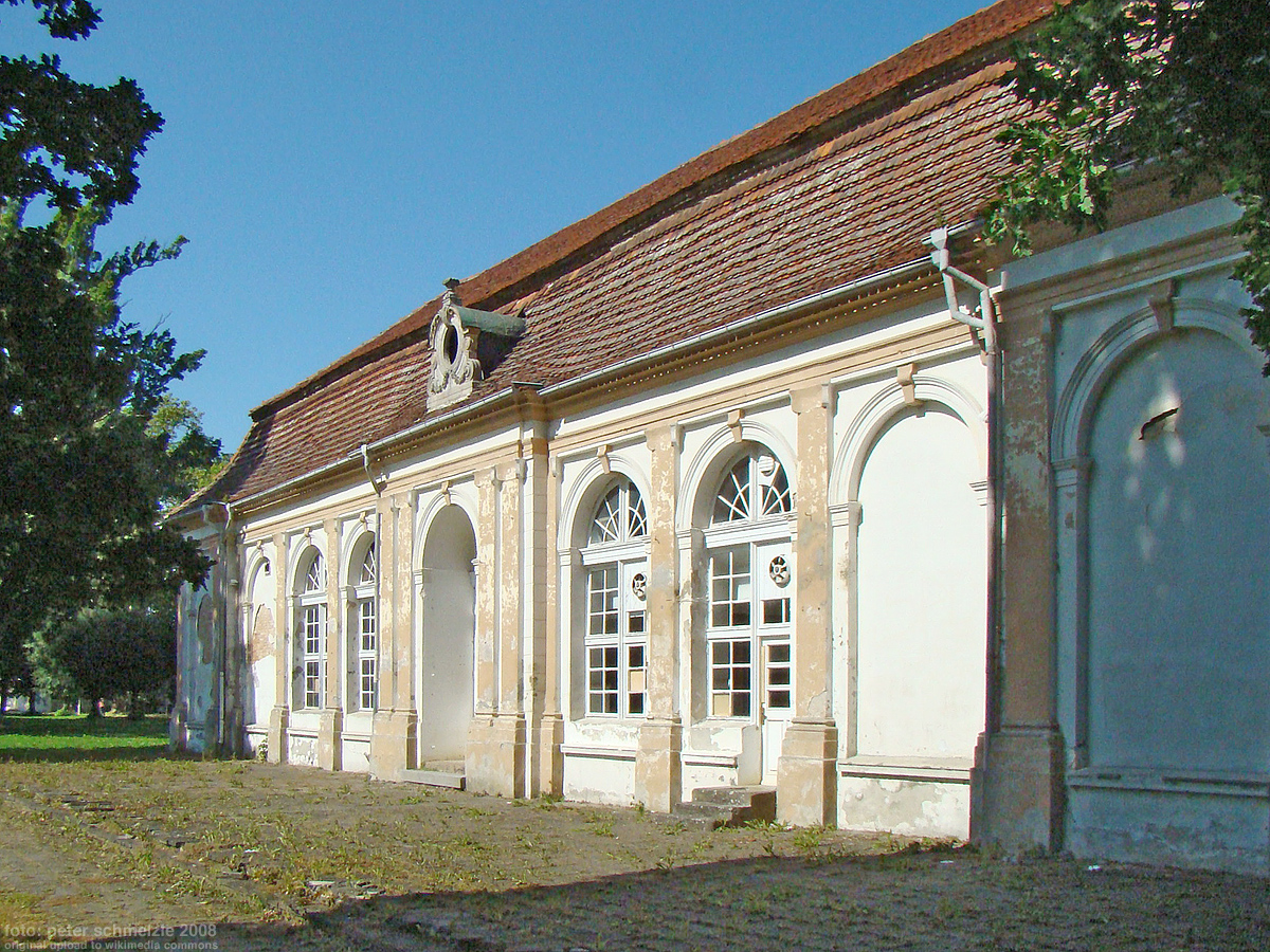 Orangerie beim Schloss Ivenack